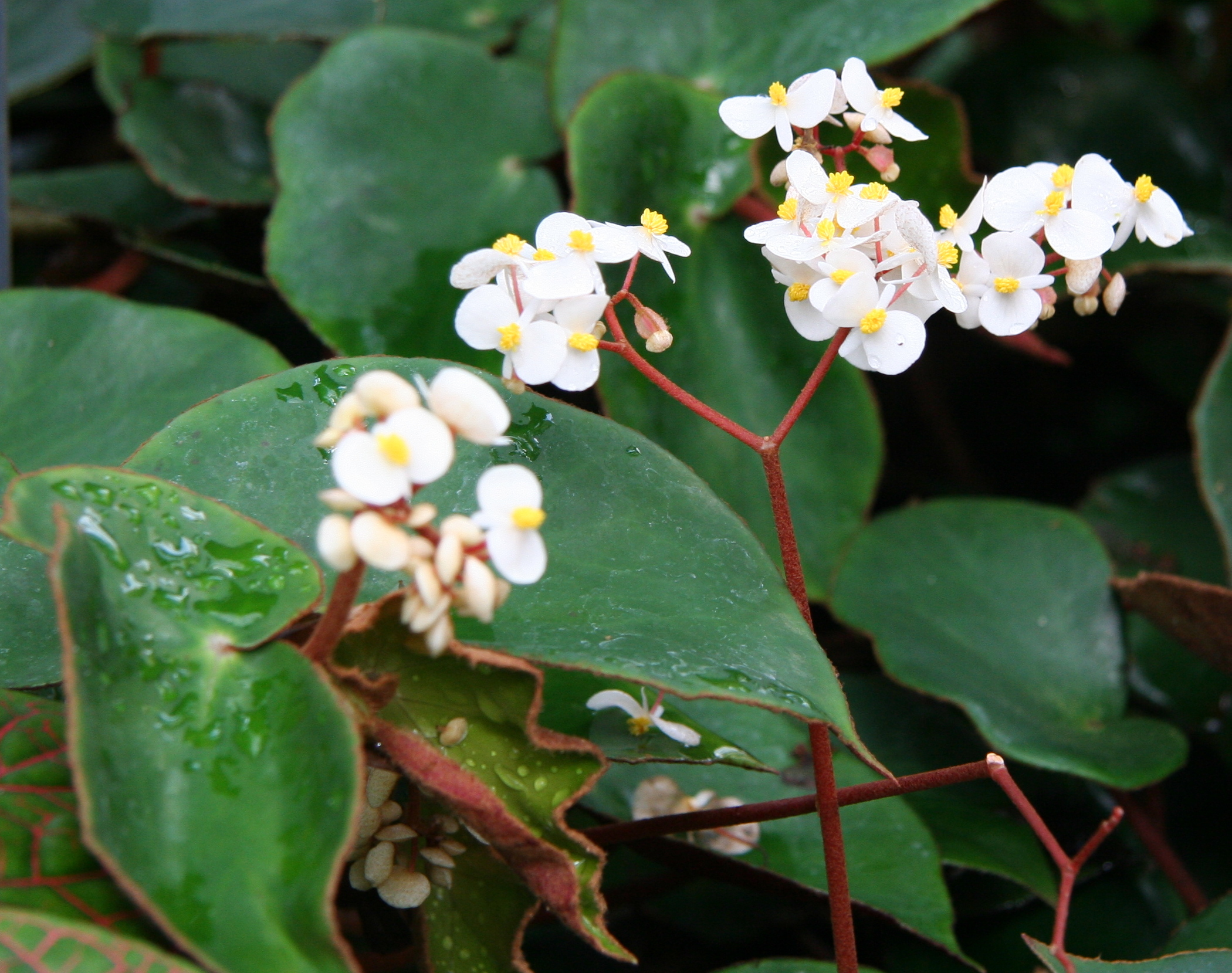 Begonia epipsila im Botanischen Garten Dresden